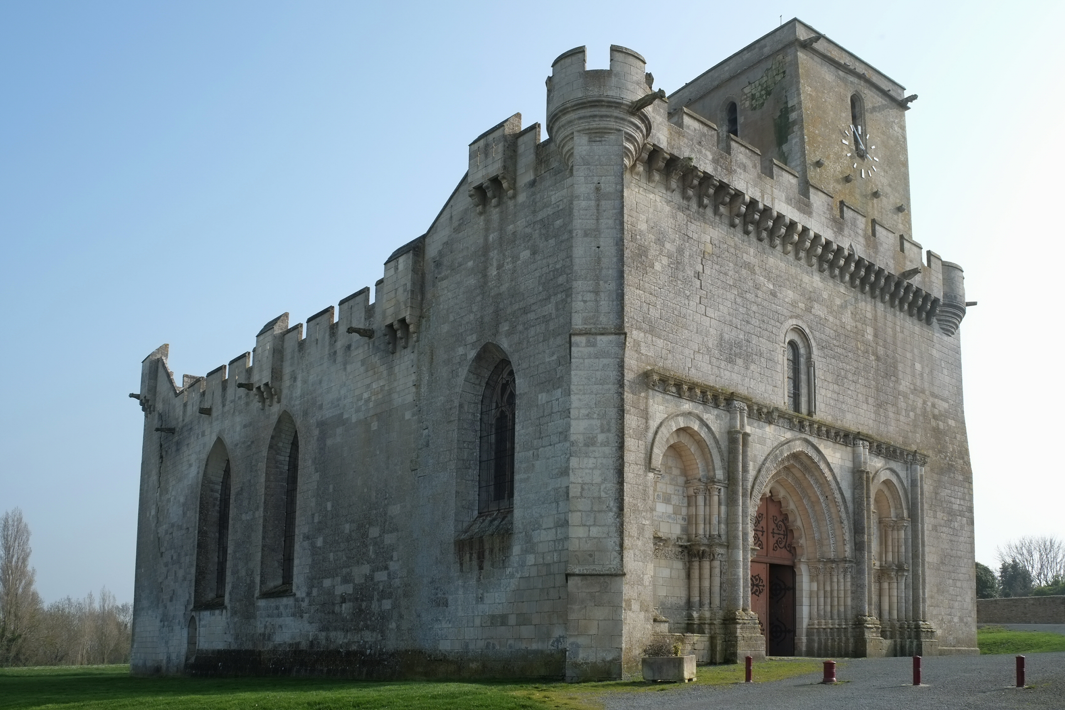 Église Saint-Martin Esnandes Charente-Maritime France